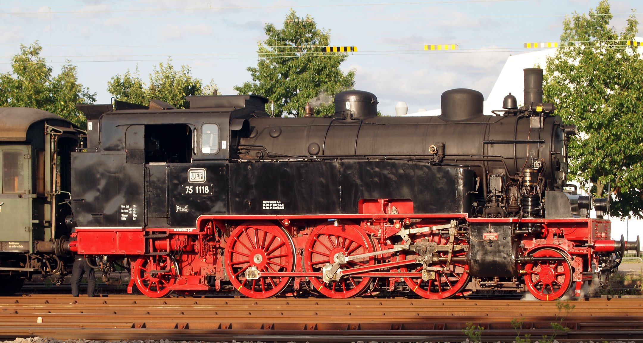 75 1118 rangiert in Ettlingen-West